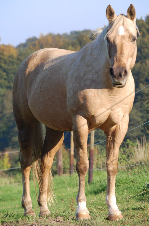 Cheval de race Quarter Horse avec une robe Café au lait